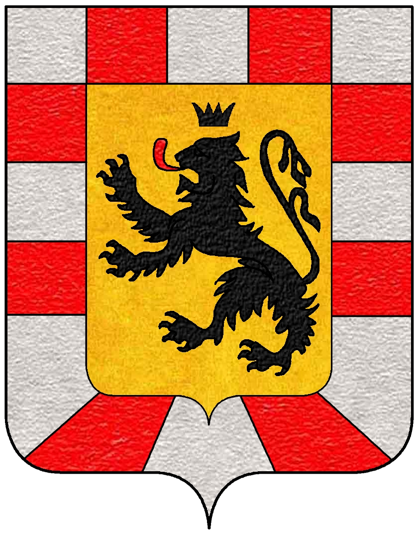 Stemma della famiglia Lanza